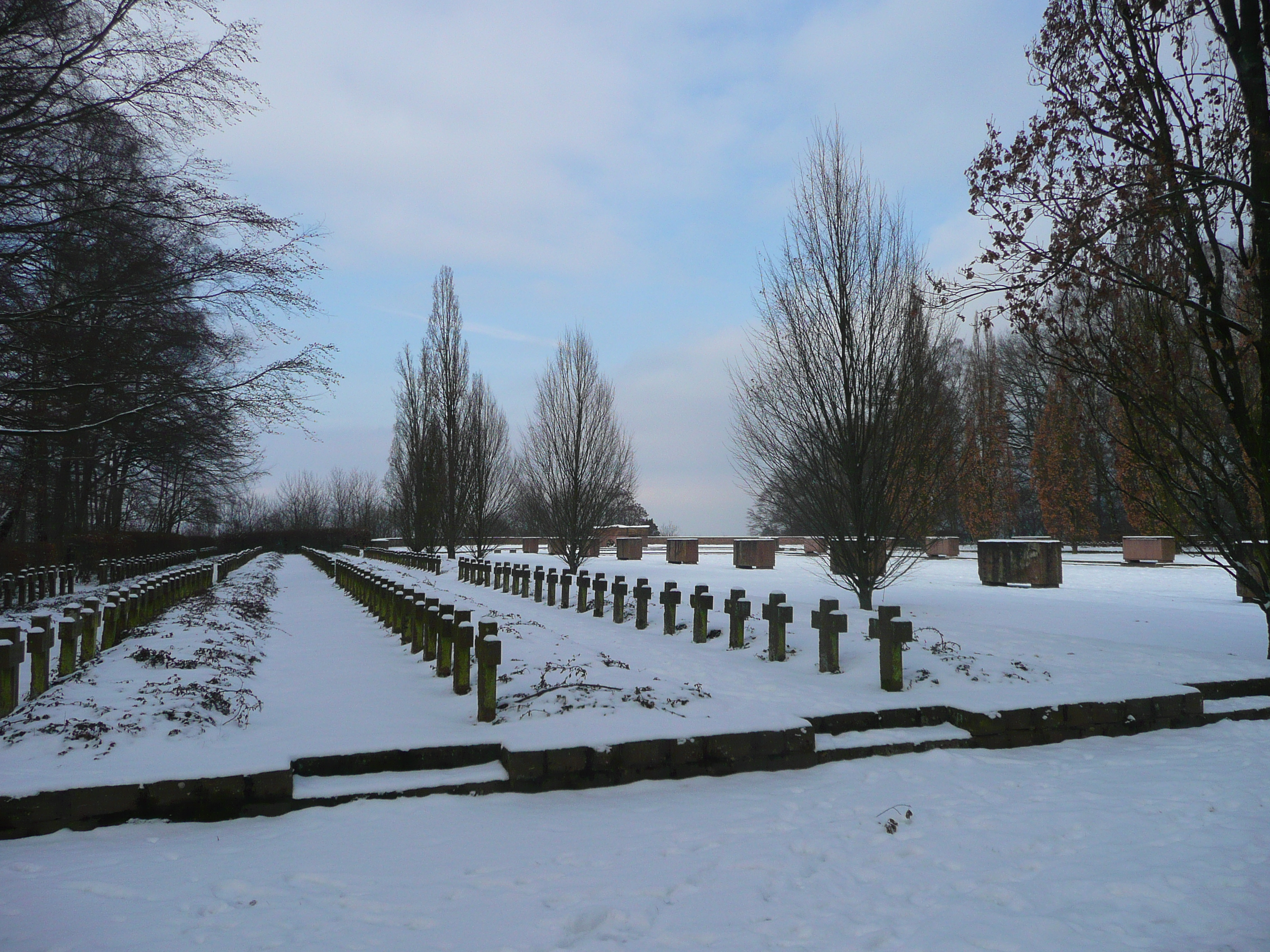 Blick auf den Ehrenhof des Heidelberger Ehrenfriedhofs (Baden-Württemberg, Deutschland)